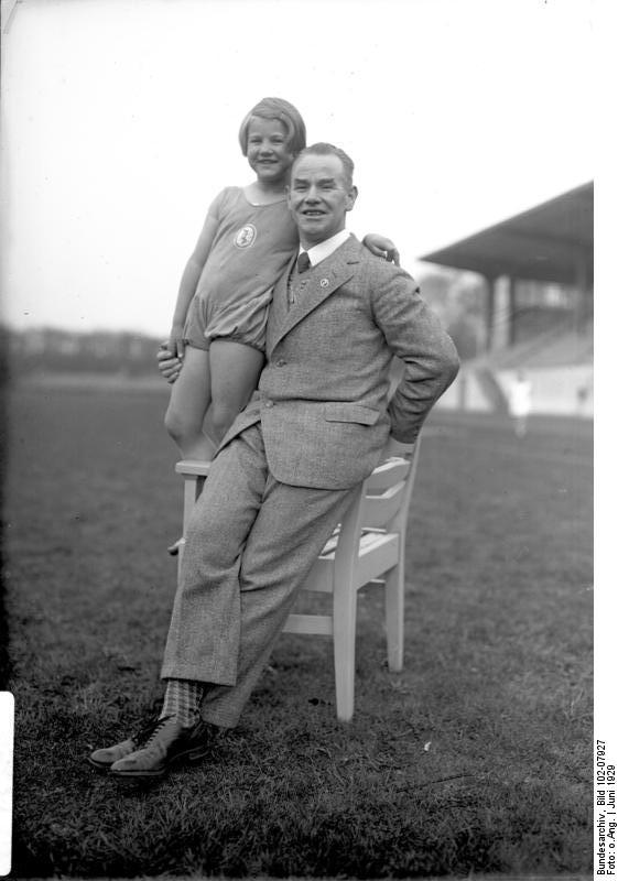 Ein Blick in die Morgenarbeit der bekannten deutschen Frauen-Muster-Turnschule Loges in Hannover. Die bekannte deutsche Frauen-Muster-Turnschule Loges in Hannover bildet im modernen Turnen Frauen und Mädchen aller Berufsstände zu gesunder Körperkultur heran.Um 7 Uhr morgens wird bereits mit der "Arbeit" begonnen, welche im Durchschnitt eine Stunde dauert, sodass die Mädchen um 9 Uhr im Büro oder an ihre Berufsarbeit frisch und munter, und gestählt an Körper und Geist erscheinen können. Herr Loges, der bekannte Schöpfer der Loges-Muster-Turnschule in Hannover mit seinem Töchterchen.